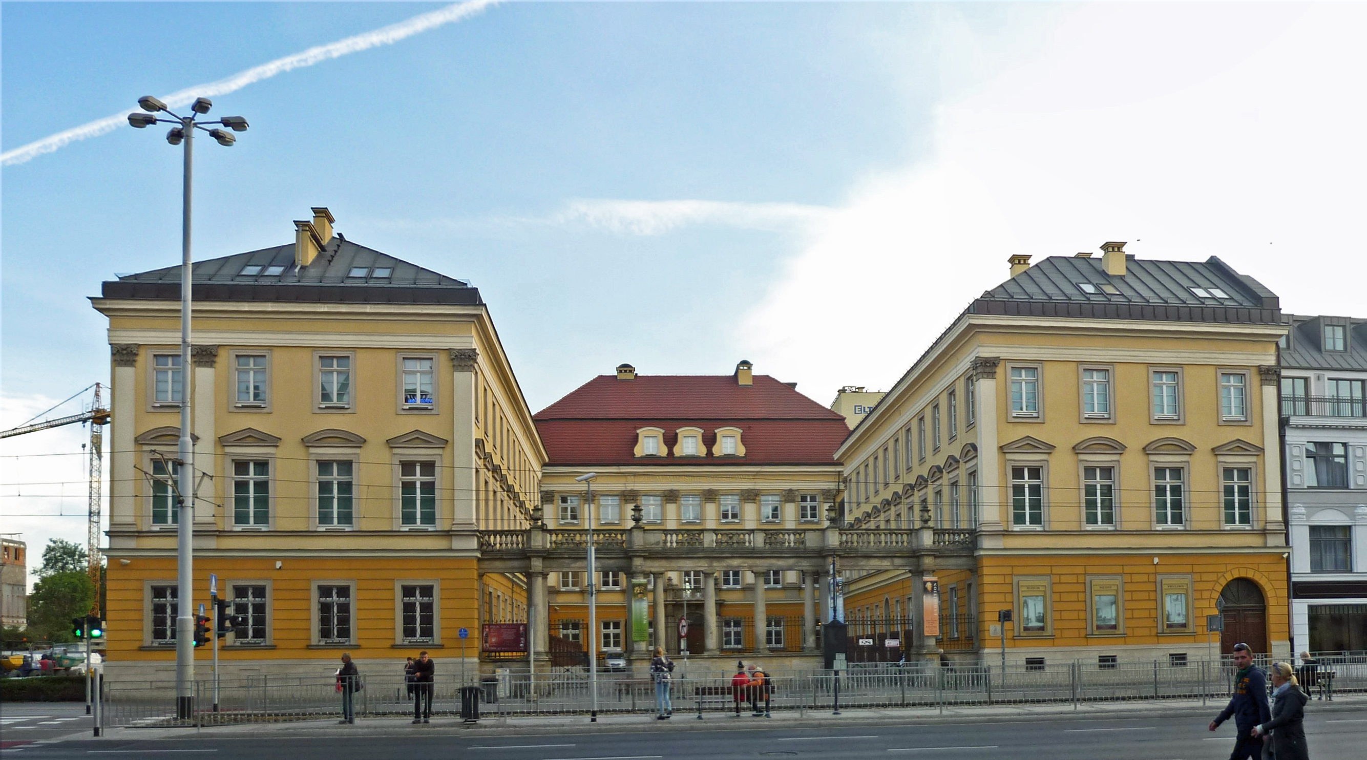 Breslauer Stadtschloss